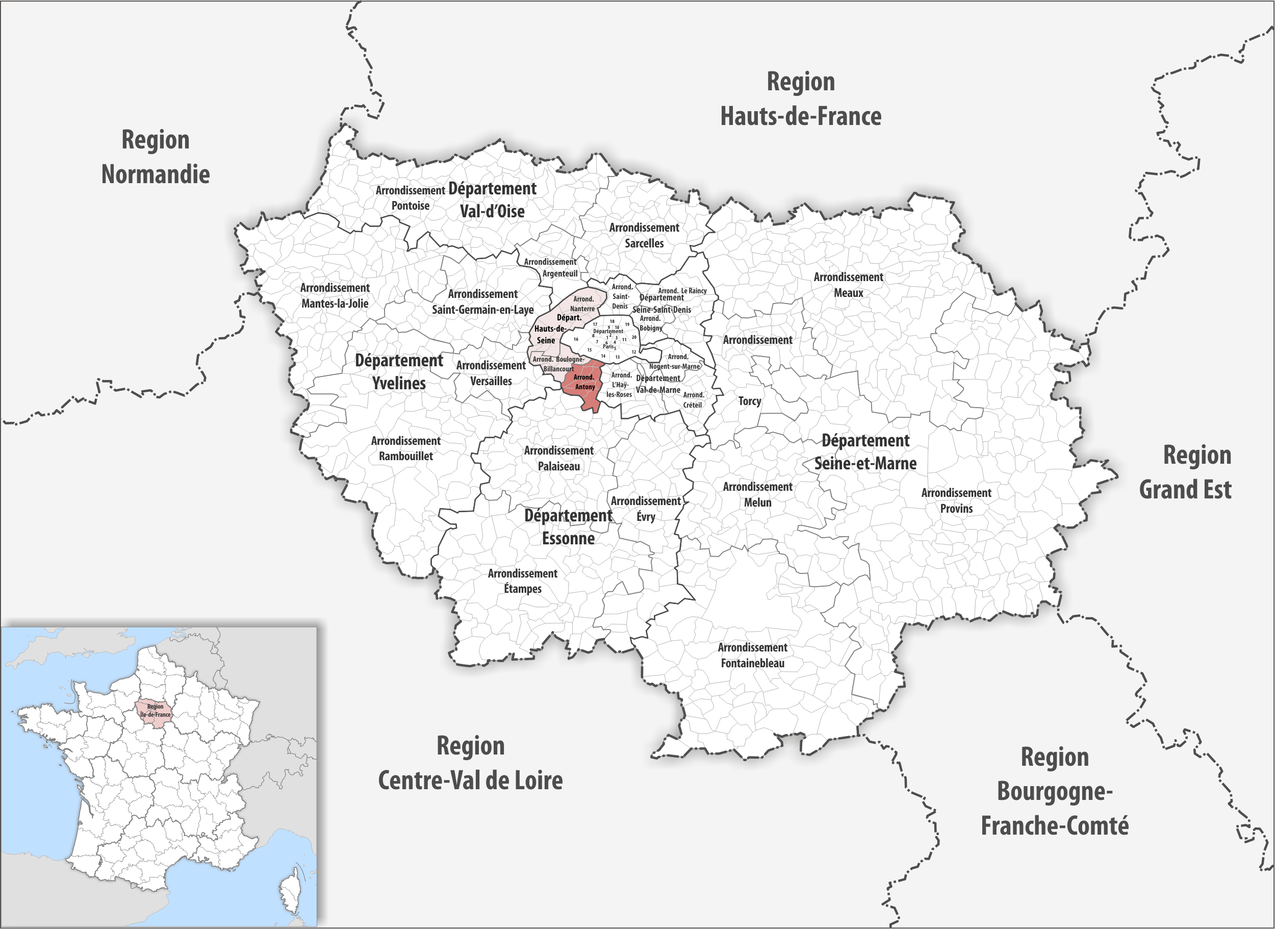 Lage des Arrondissements Antony